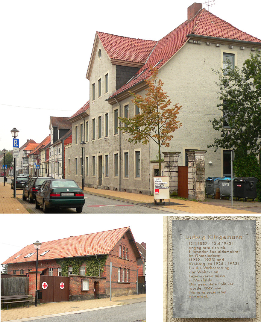 als Sitz des Amtes Vorsfeldes 1801 fertiggestelltes Gebäude, später Amtsgericht Vorsfelde, heute Ludwig Klingemann-Haus